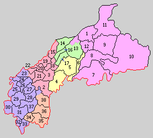 愛知県丹羽郡の町村制時点の町村。